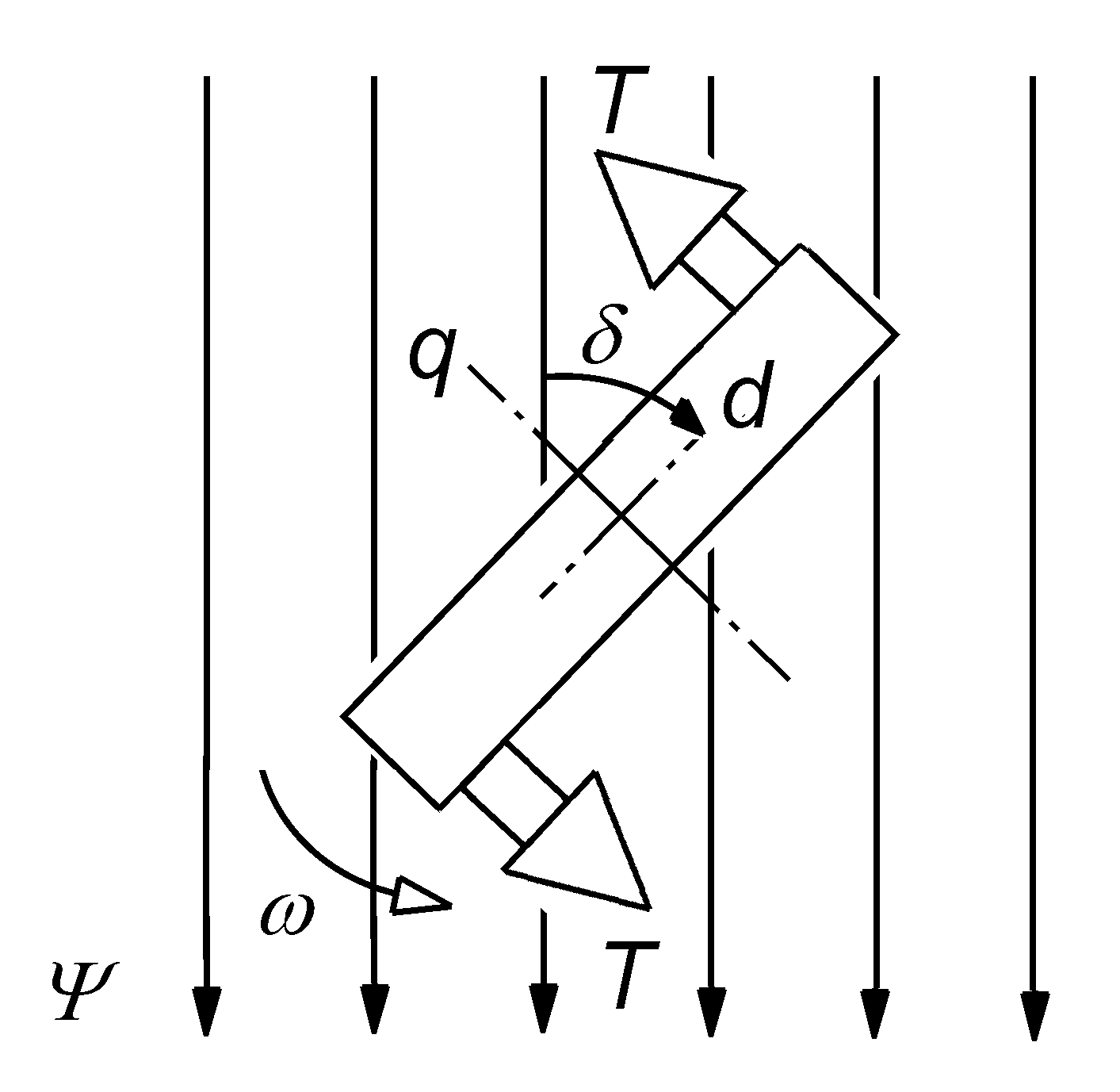 Drehmomenterzeugung Reluktanzmotor basierend auf Prof. Prof. h. c. mult. Dr.-Ing. Peter F. Brosch (Daniel Gontermann, KSB AG)